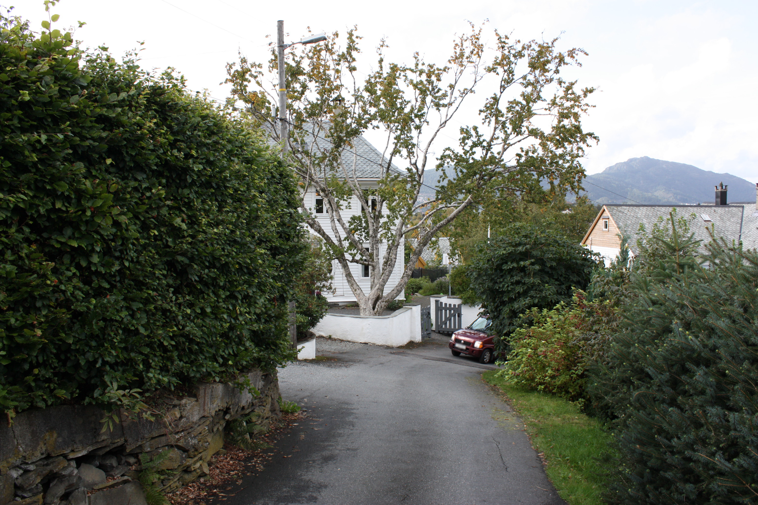 Nesttunkollen, Fana, Bergen.